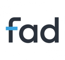 Logo de FAD